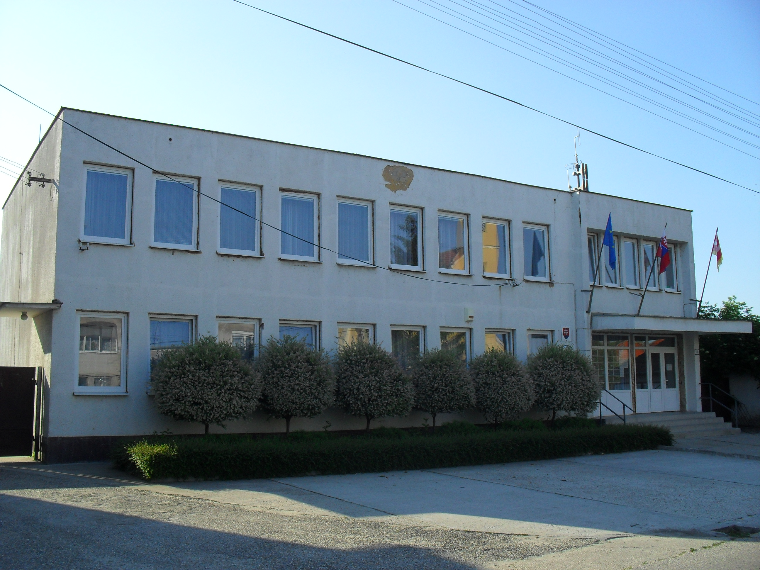 Csallóközaranyos - községi hivatal